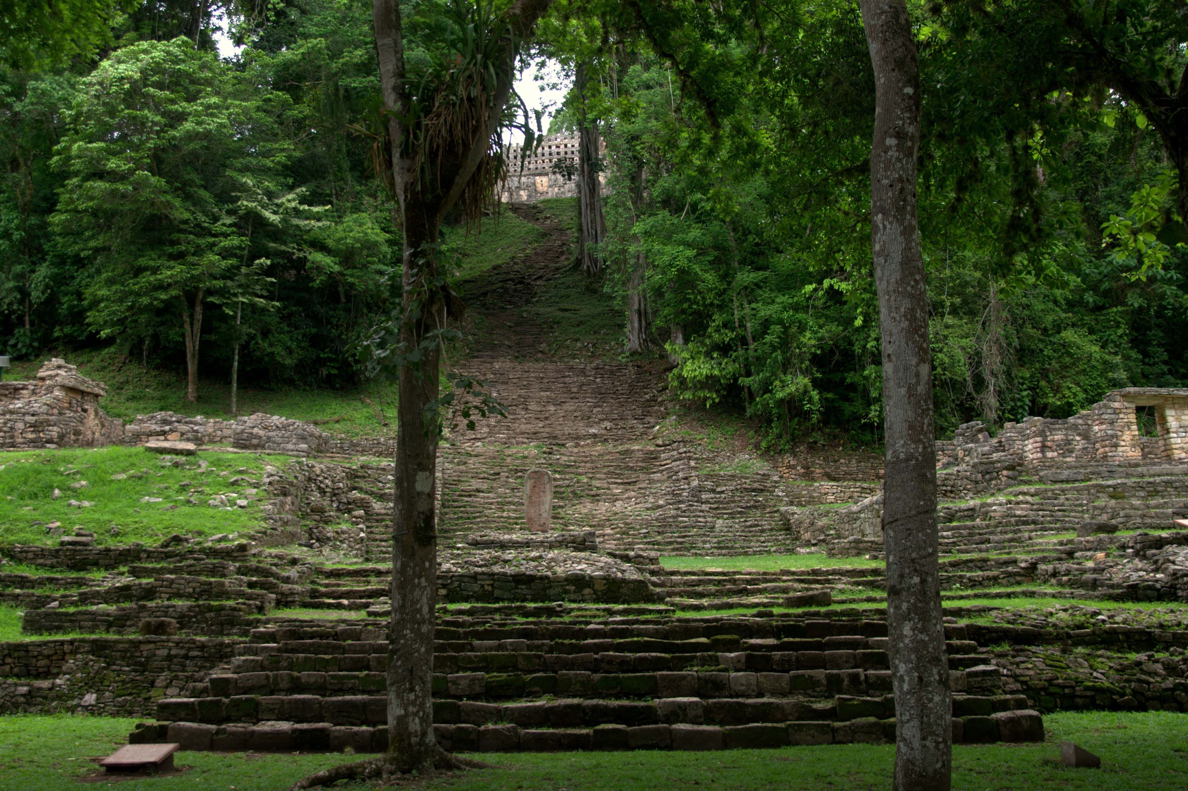 Zona Arqueológica Yaxchilán, vista de la escalera que conduce al Edificio 33 desde la Gran Plaza